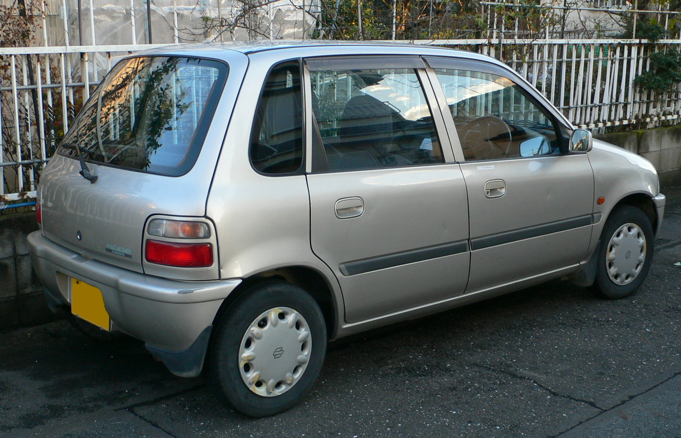 4th generation Suzuki_Cervo-Mode (1990 - 1995)